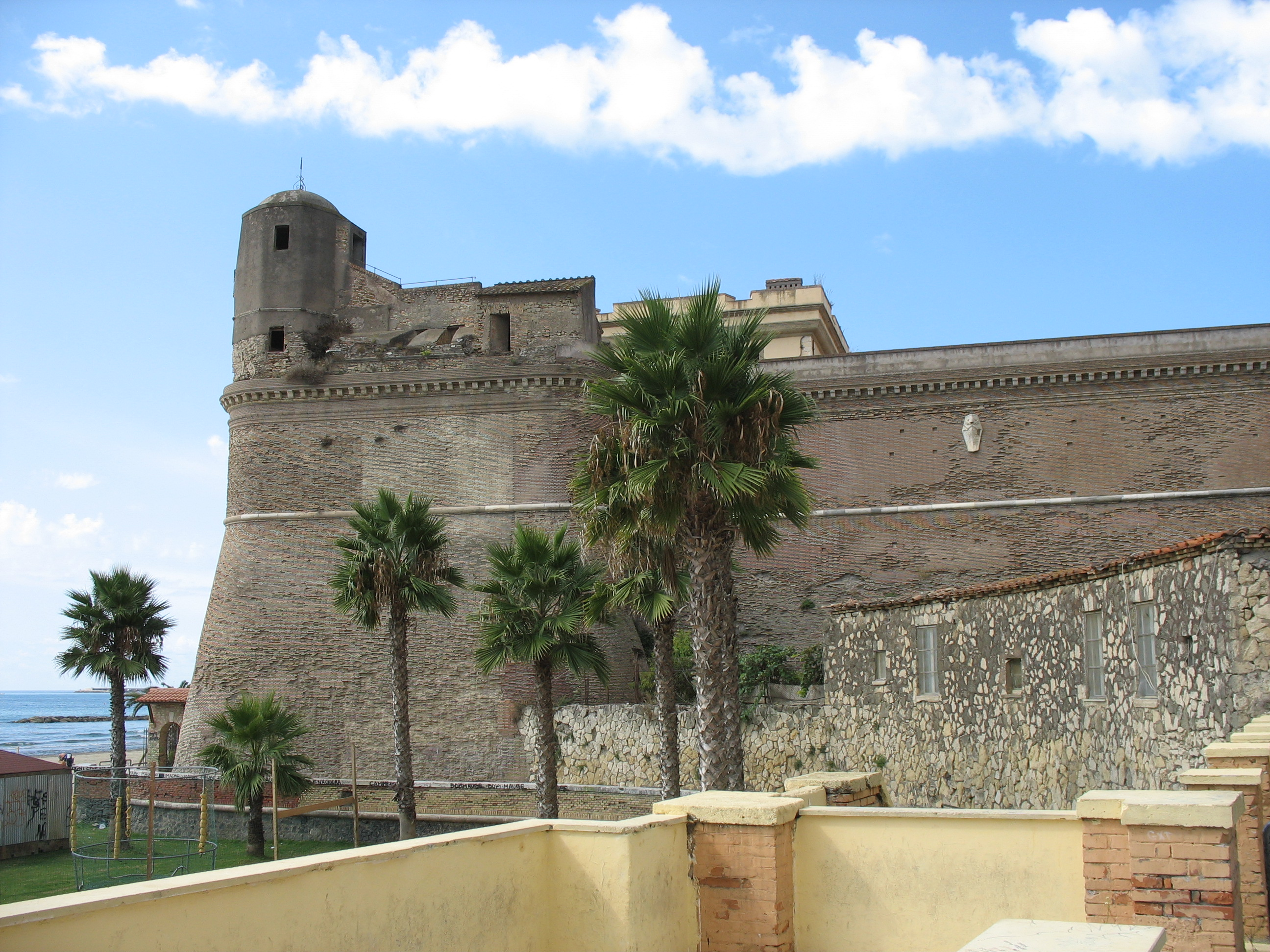 stefano, foto scattata da me